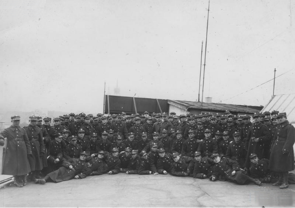 Fotografia grupowa żołnierzy 75 Pułku Piechoty na dachu Pałacu Prasy w Krakowie.